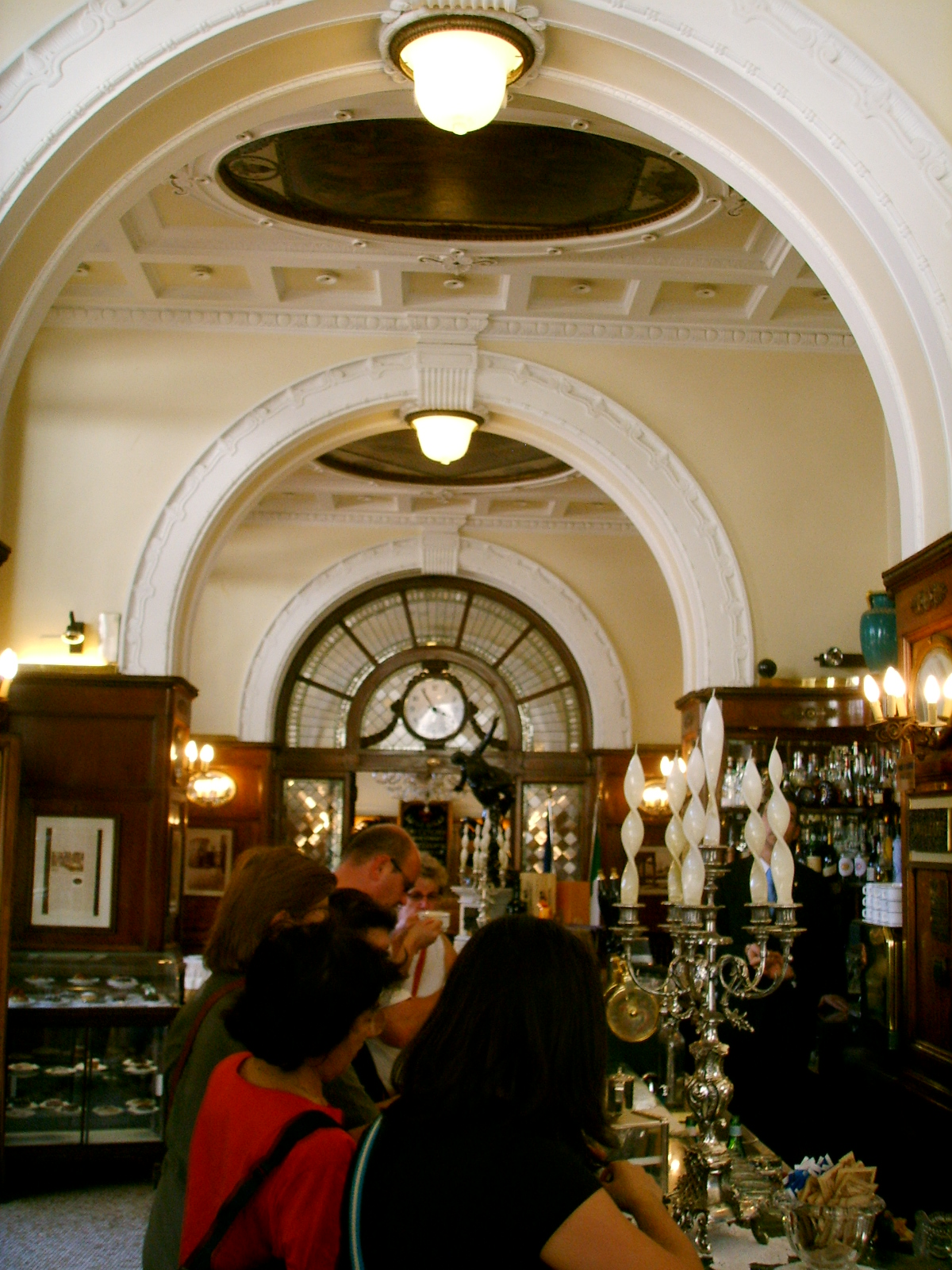 Caffé gilli in